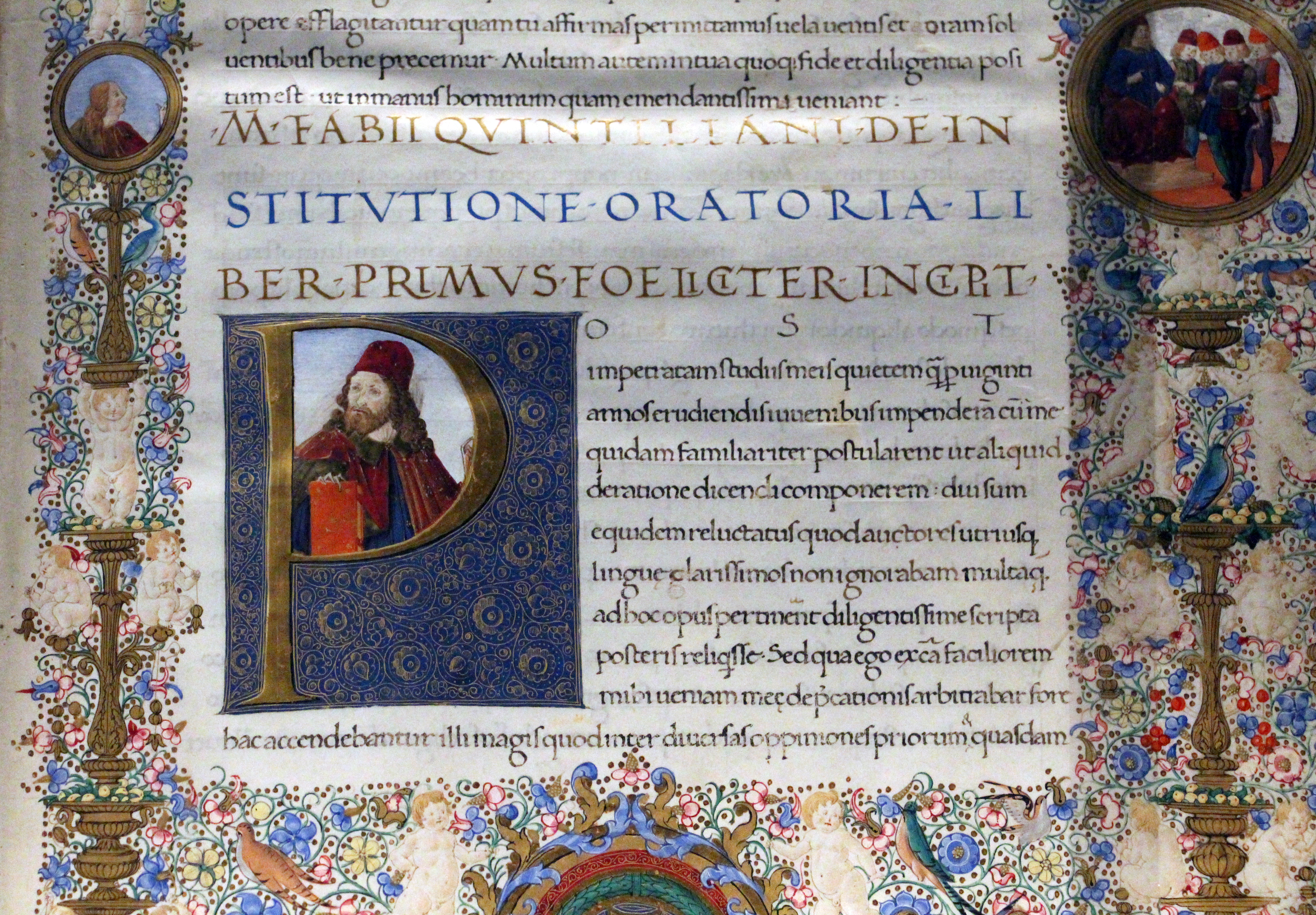 Biblioteca Medicea Laurenziana